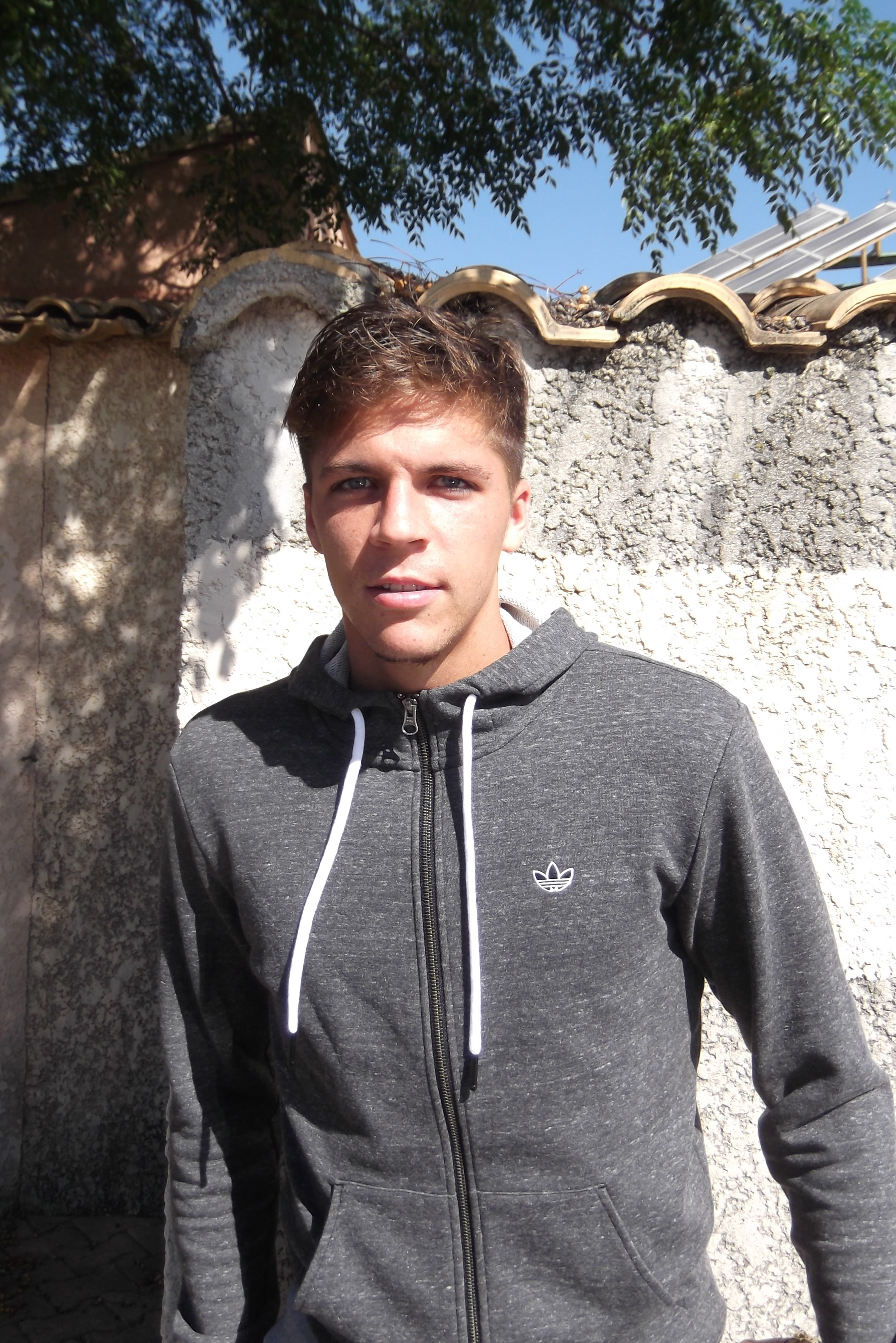 Jonas Martin, août 2013.